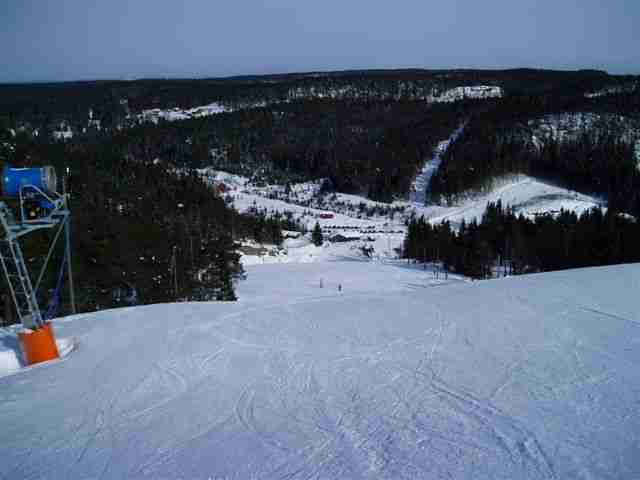 Kjerringåsen Alpinsenter. Bildet er tatt av JohnM i mars 2006.